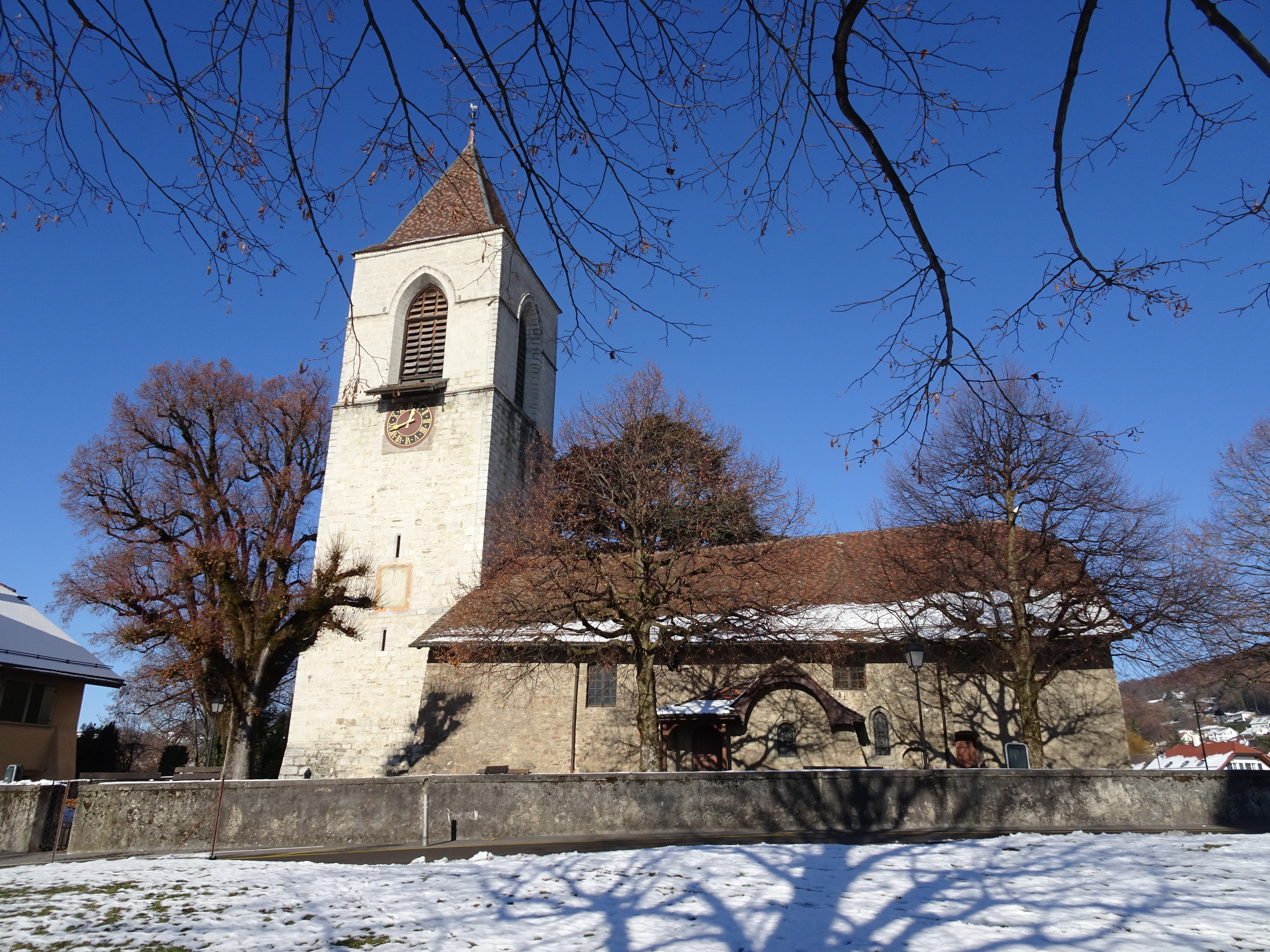 Eglise avec sa tour commencée au XV ème siècle